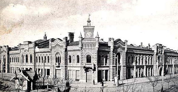 Clădirea Primăriei municipiului Chişinău la începutul sec. al XX-lea